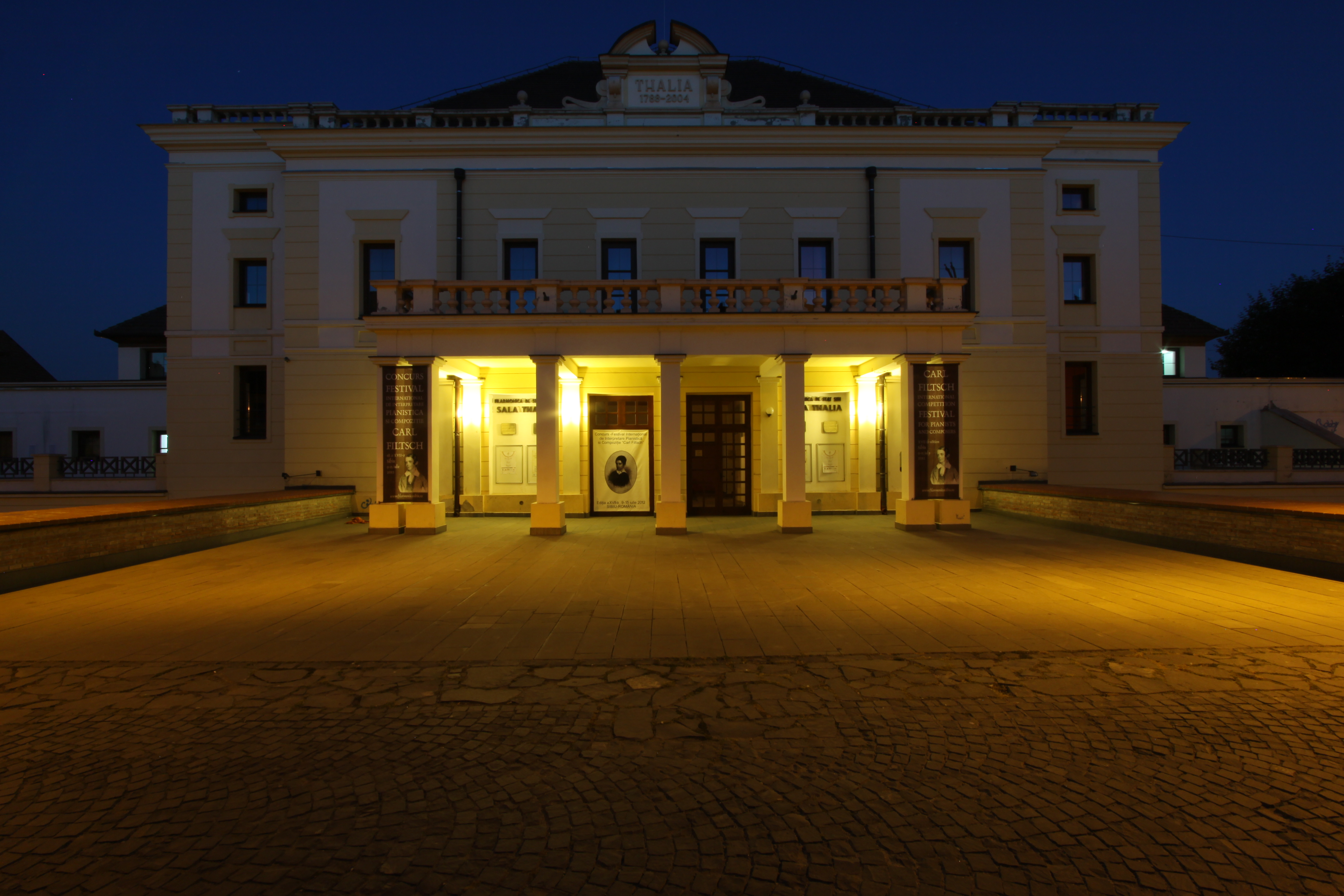 Sala Thalia (teatru orășenesc între 1788- 1945), construită pe Turnul Gros